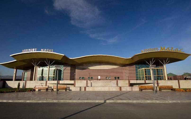 Аэропорт Магас, вид спереди